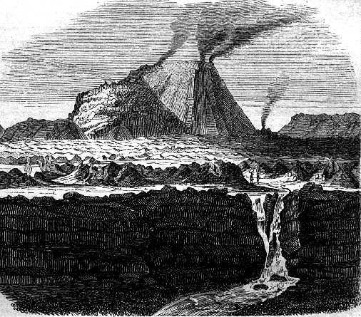 El Jorullo Author died more than 100 years ago